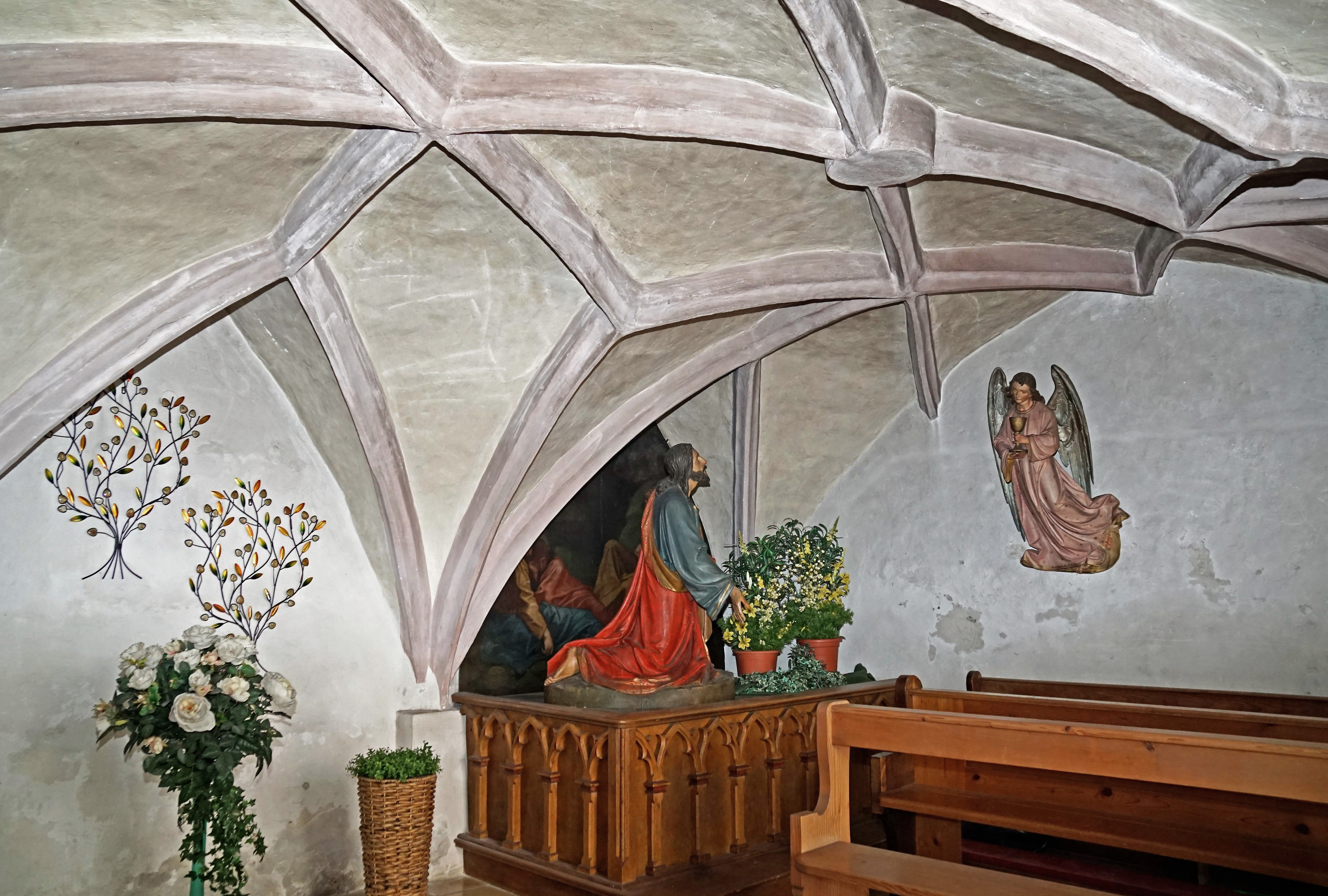 Pfarrkirche St. Margaretha (Frasdorf), Innenansicht der Friedhofskapelle